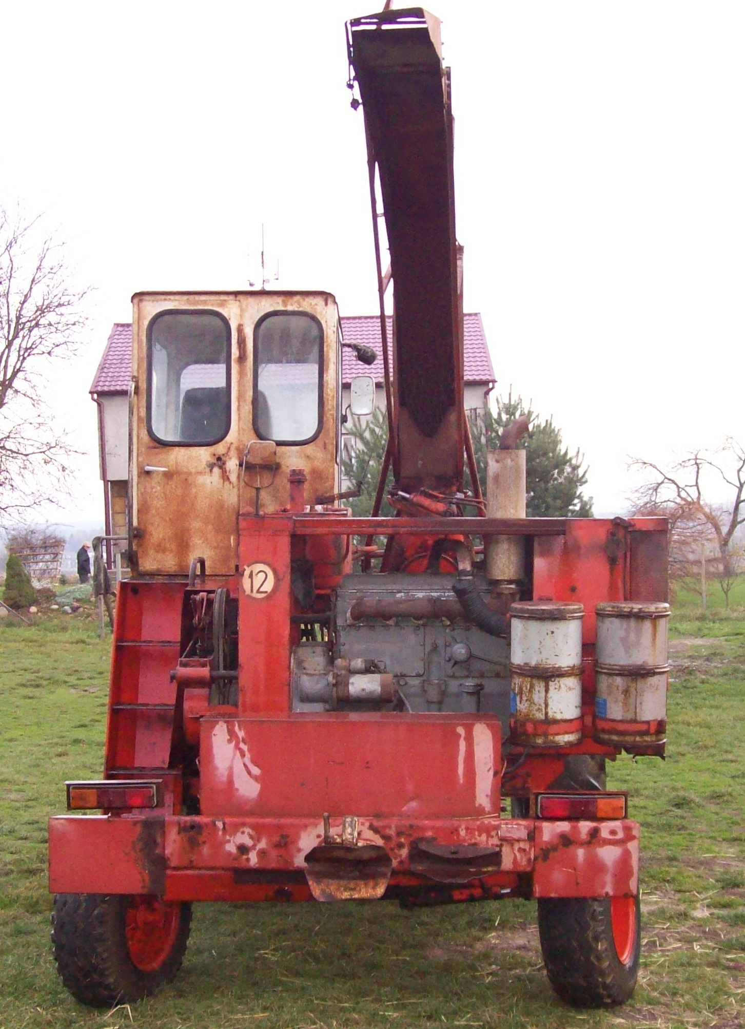 Sieczkarnia Z320 - widok z tyłu (1)